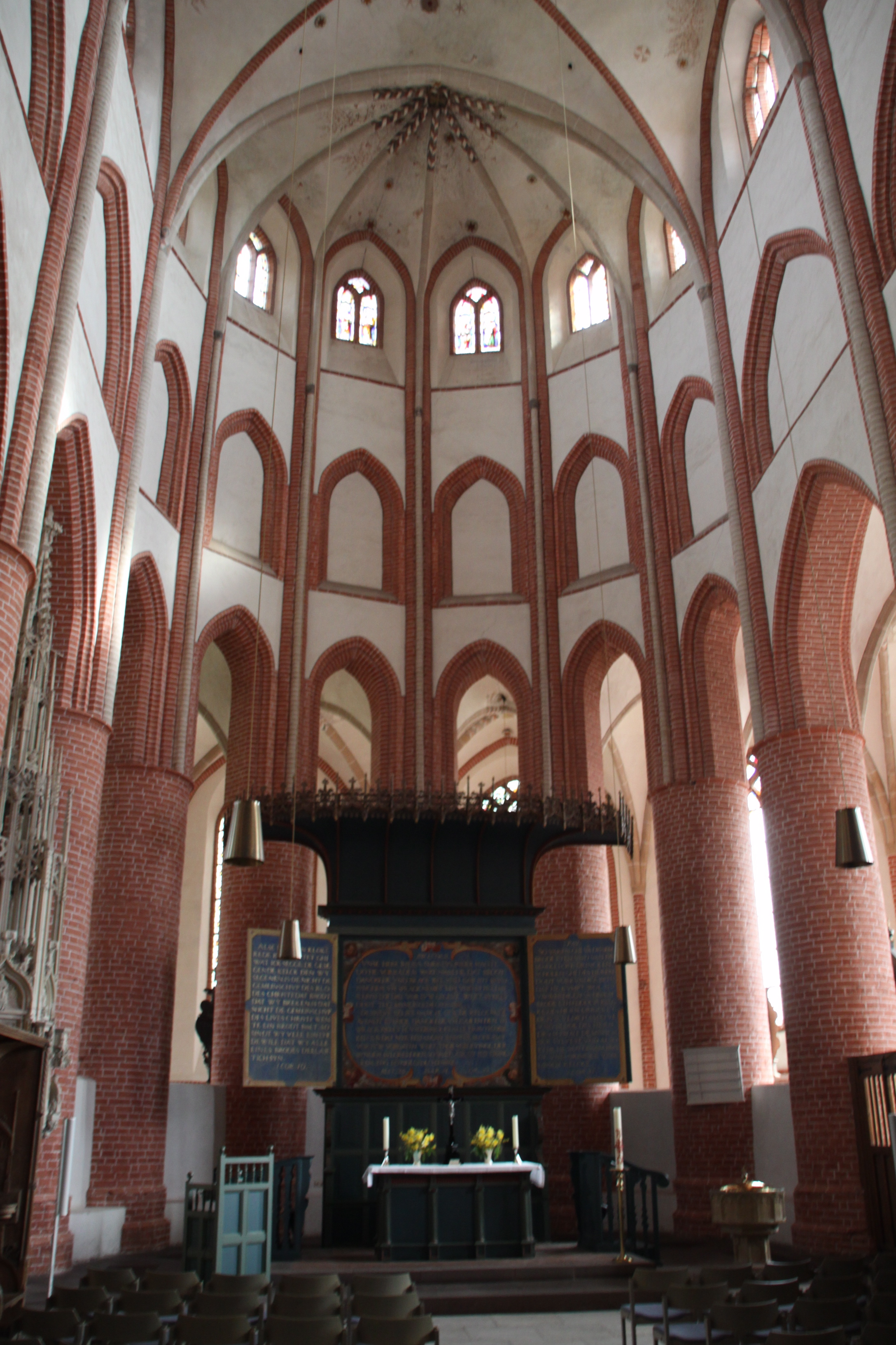 Ludgerikirche- Chor und Altar